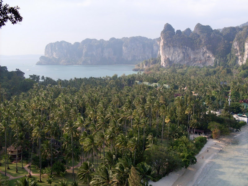 Krabi Railay Plaji